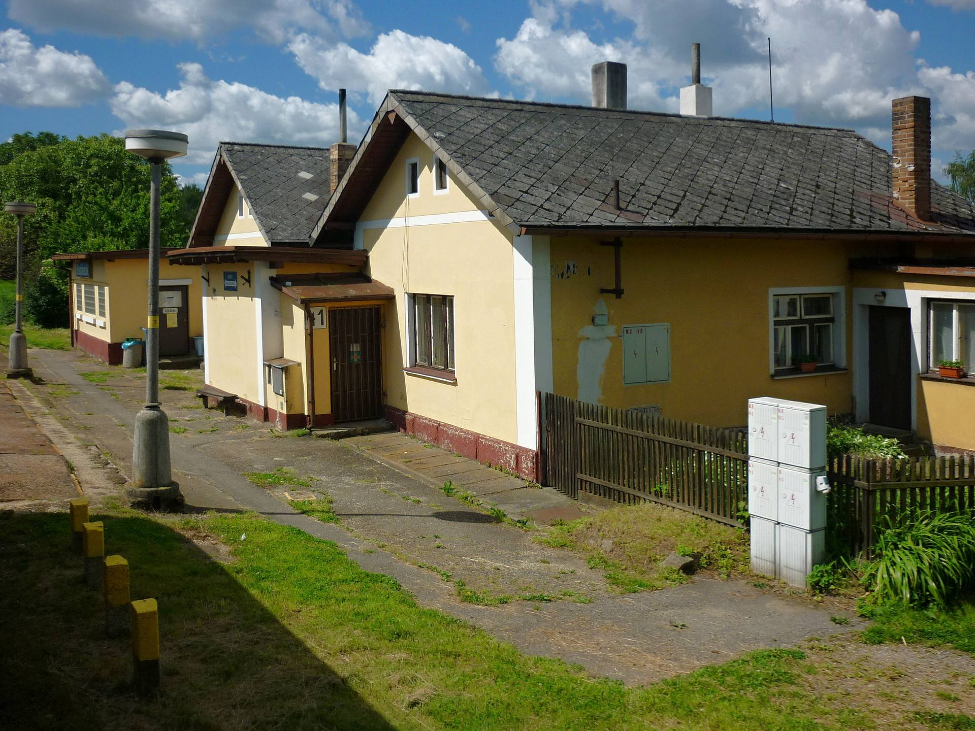 Železniční zastávka Bednáreček na trati č. 225